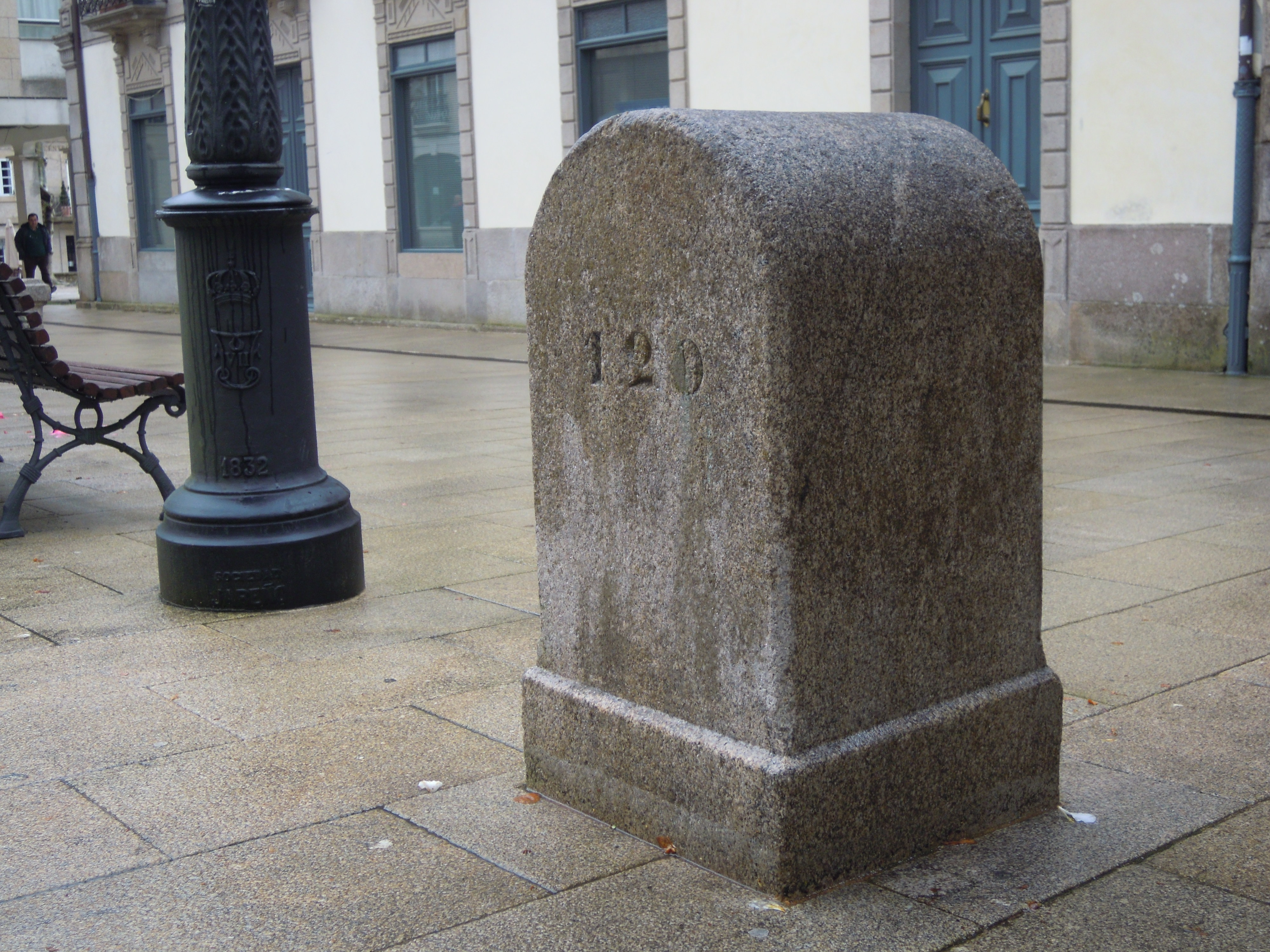 Fito miriamétrico 120 da estrada C-531 na vila de Ponte Caldelas